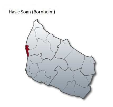 Hasle Sogn